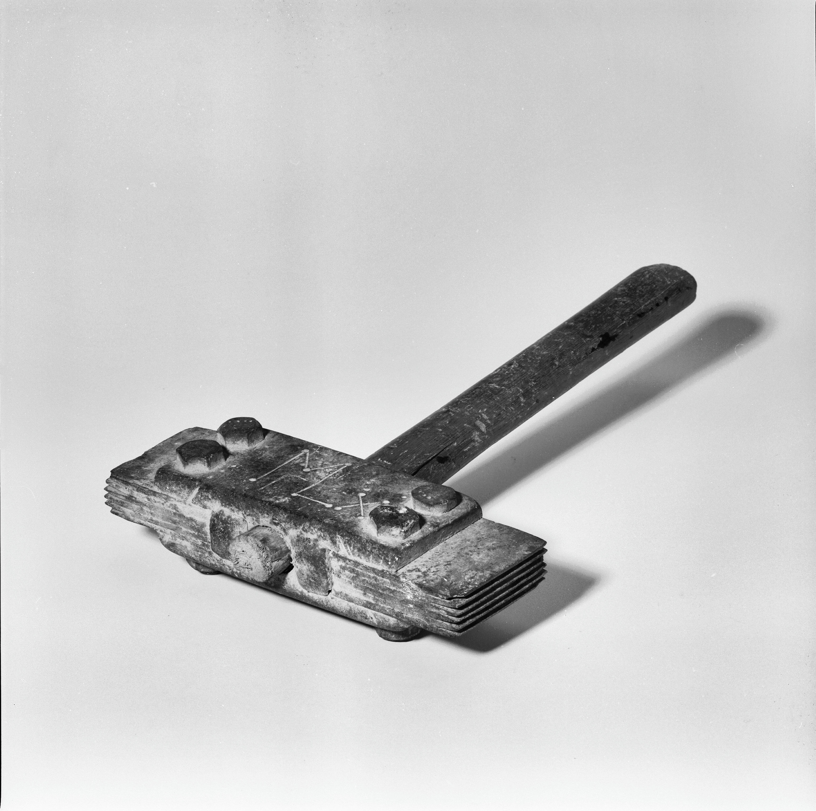 ATELIER: INTERIEUR, GEREEDSCHAP: VLECHT